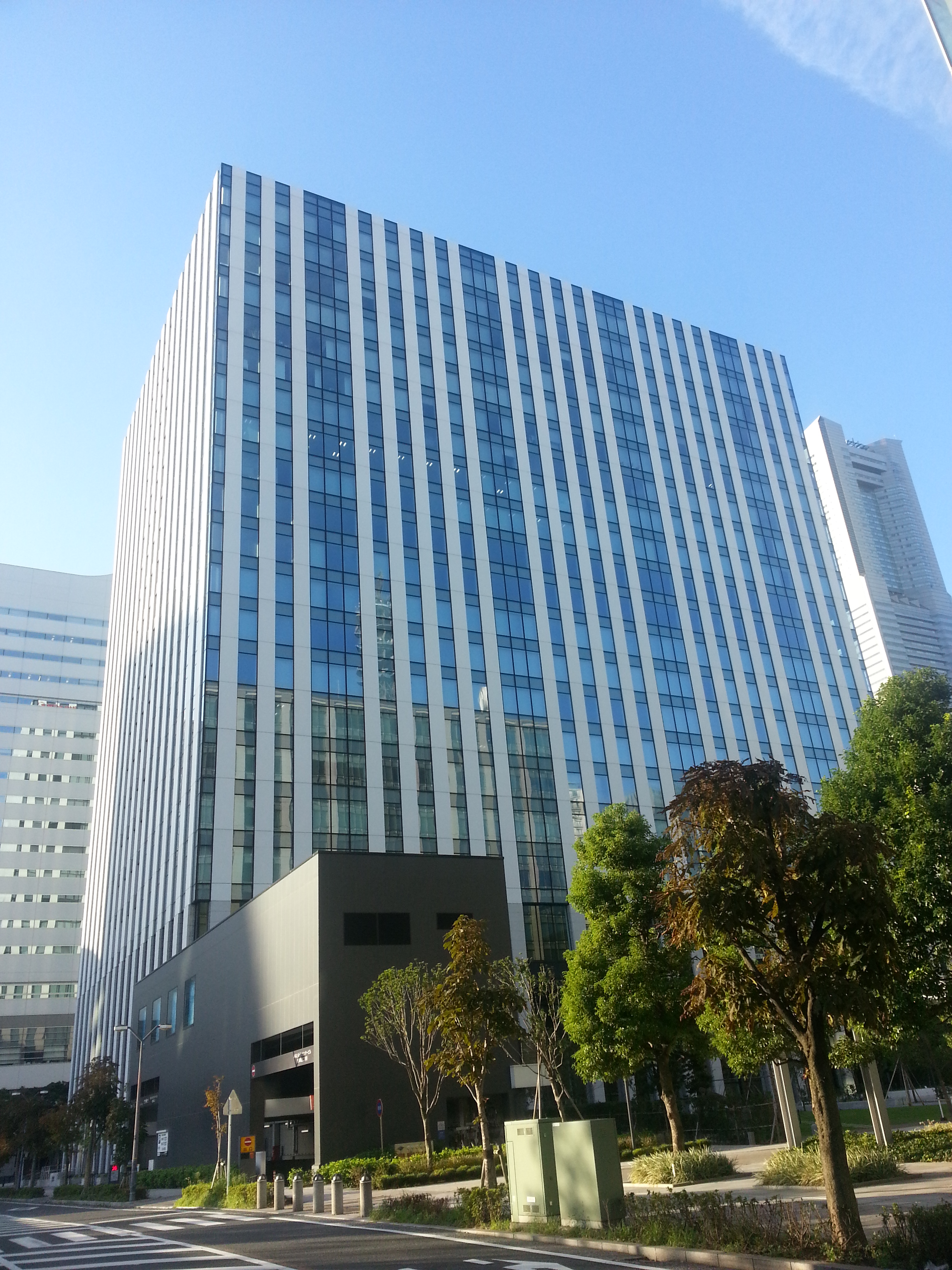 横浜みなとみらい地区にある、みなとみらいセンタービル。